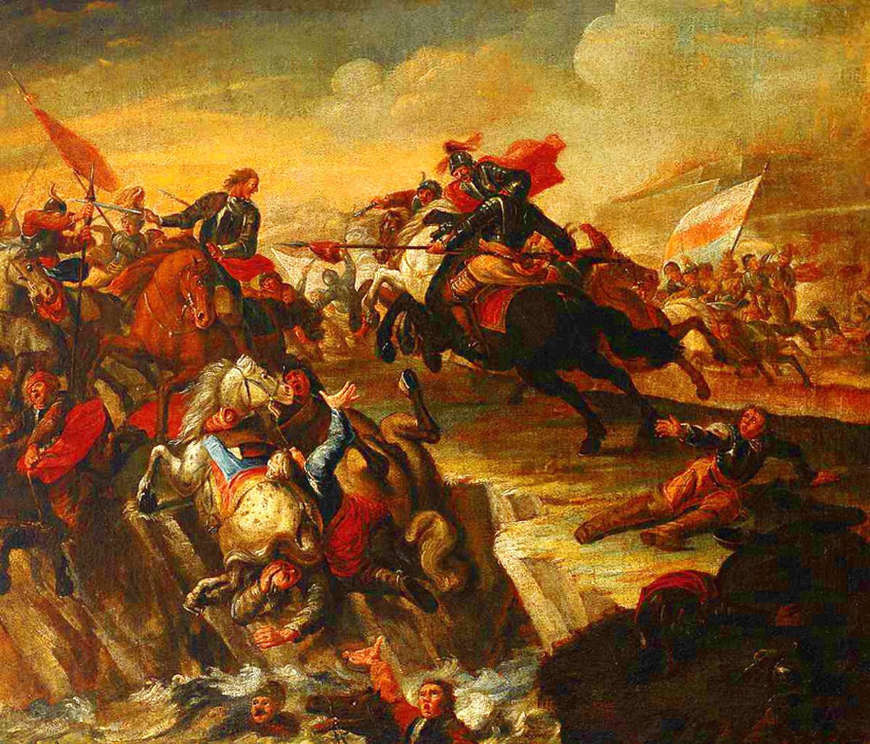 Kuruc és Osztrák csatajelenet